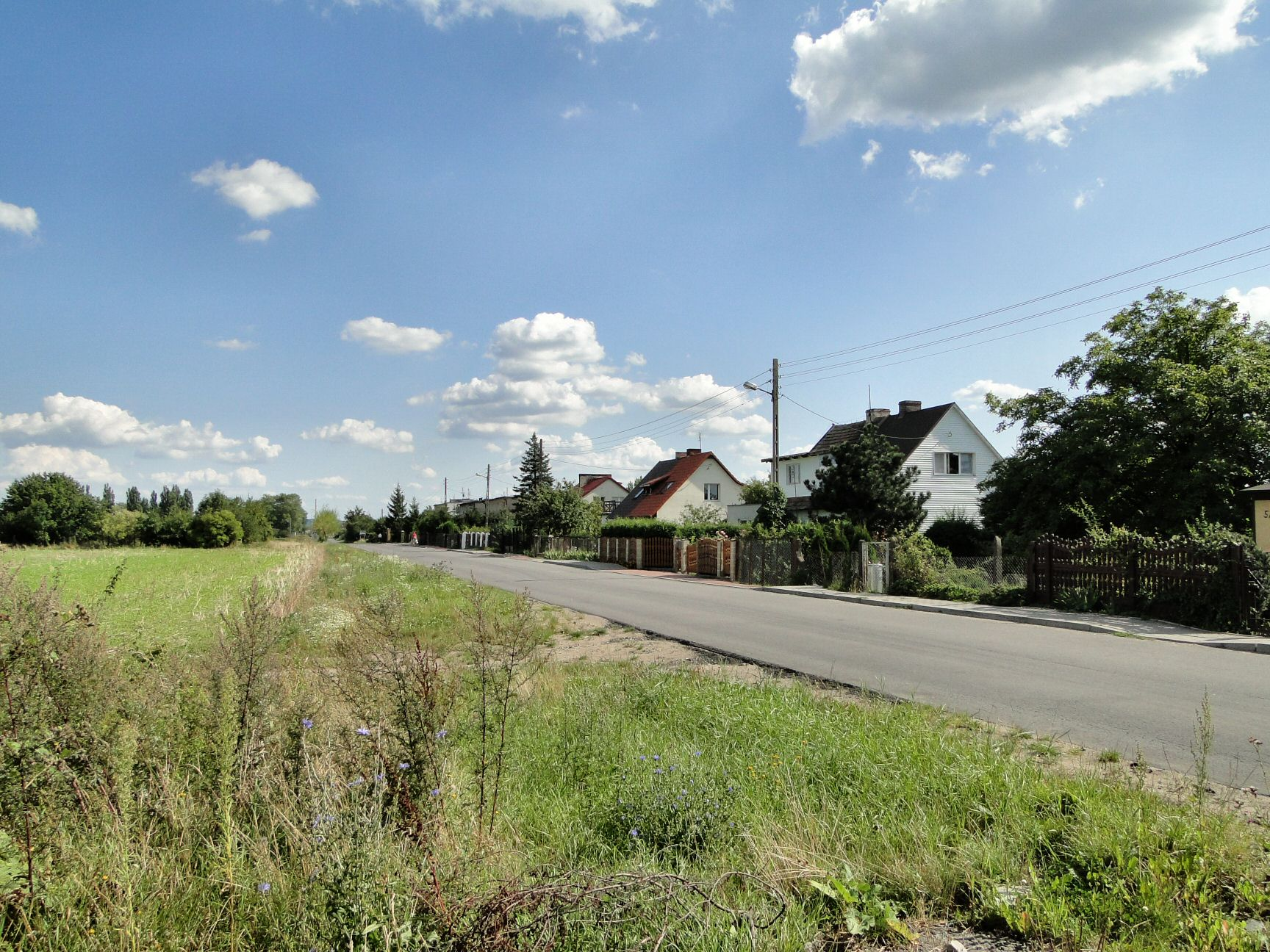 Rajkowo